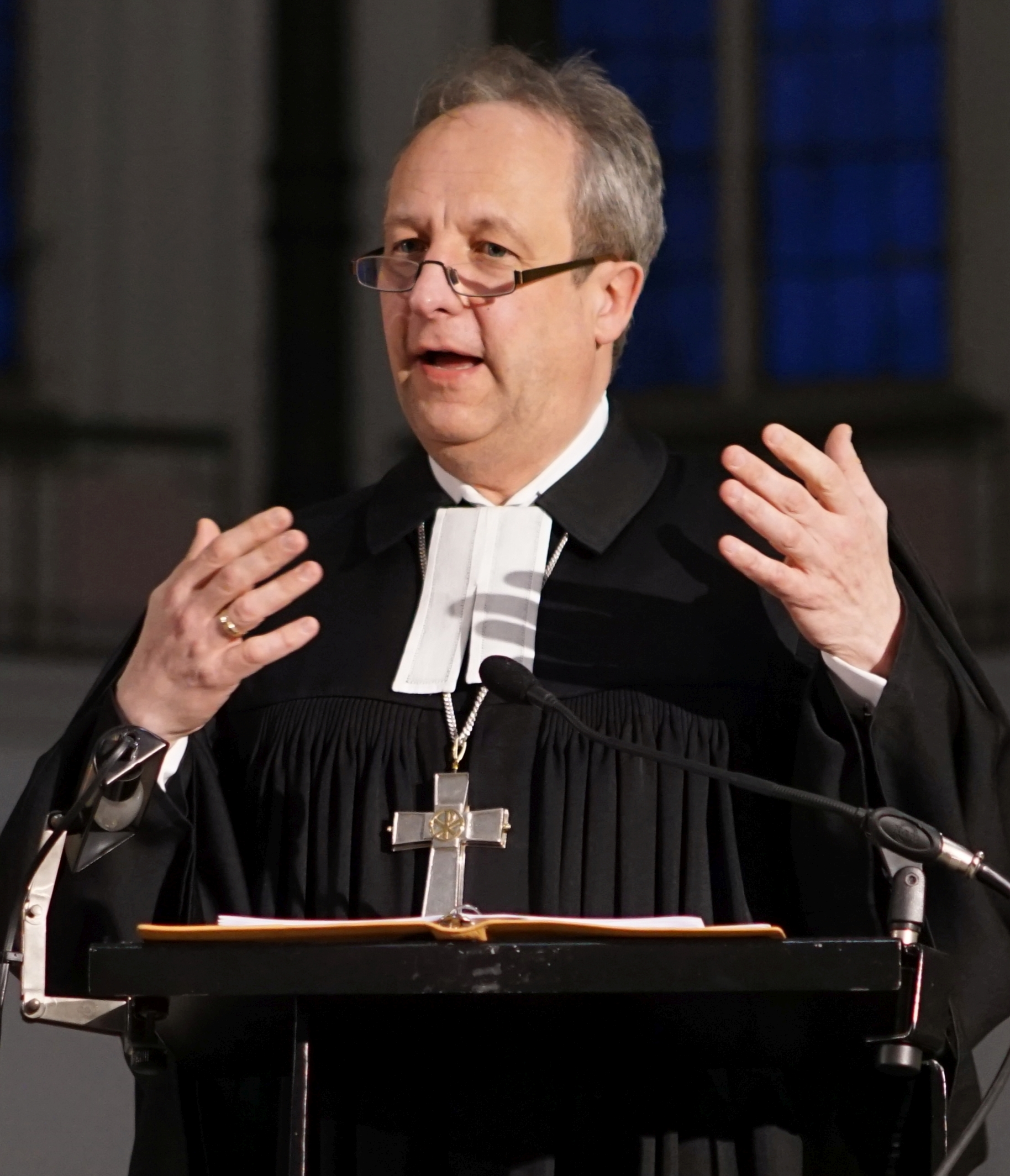 Stäblein predigt im Festgottesdienst 150 Jahre St. Thomas-Kirche Berlin Kreuzberg am 21.12.2019